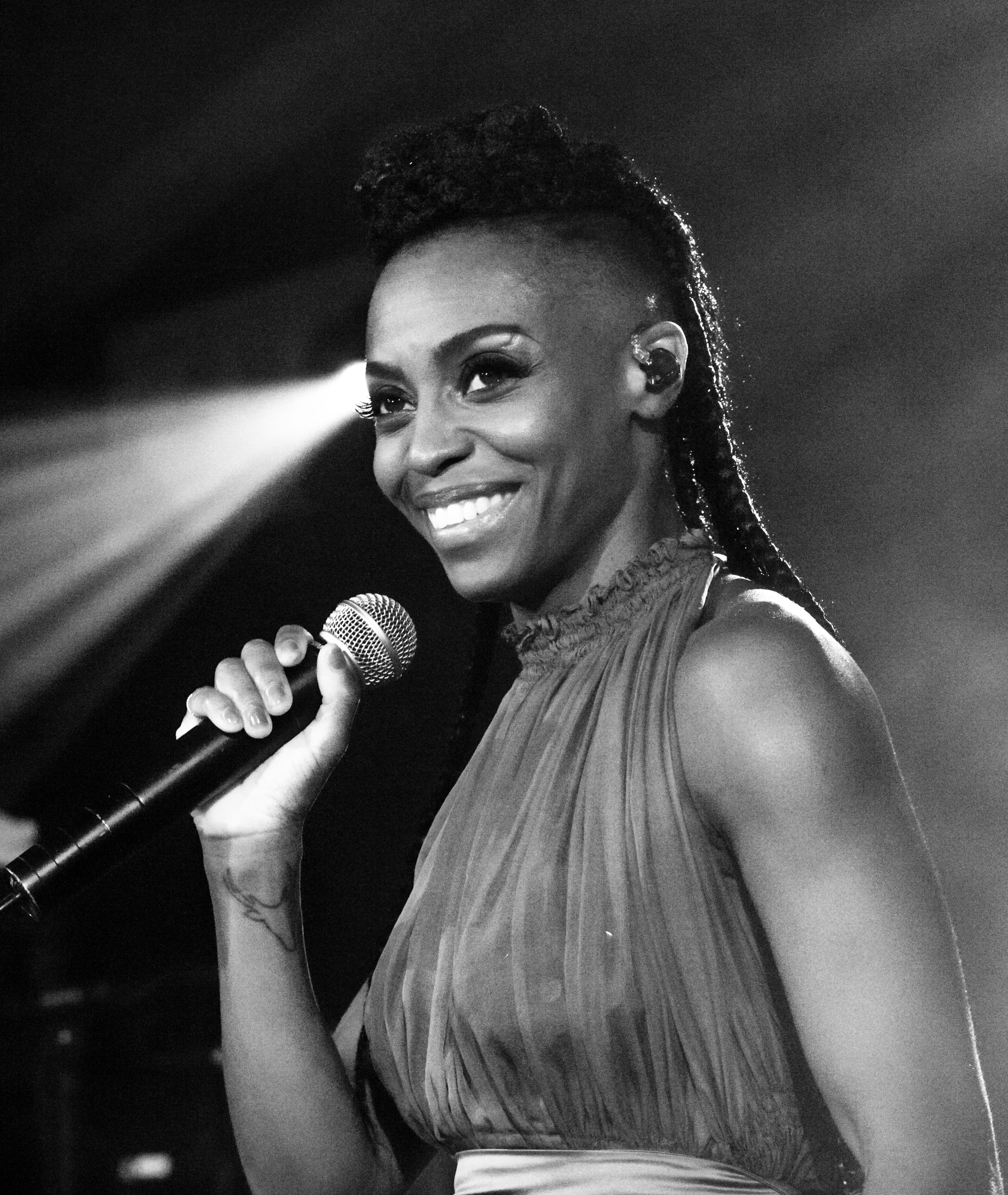 Bilder vom Zelt Musik Festival 2018 in Freiburg im Breisgau Morcheeba Auftritt am 31. Juli 2018 im Speigelzelt